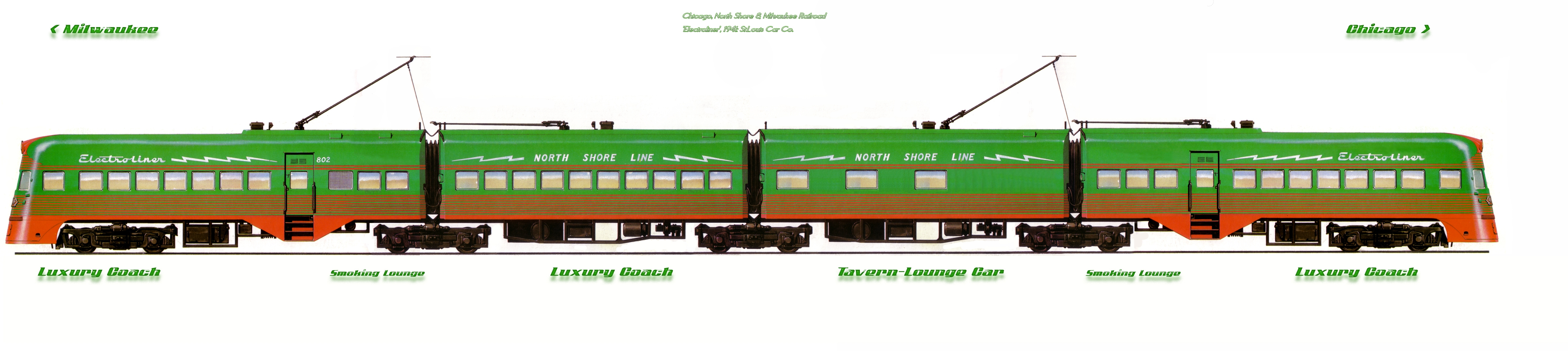 Zelfgetekende tekening m.b.v. een voorbeeld. Daarna bewerkt en ingekleurd n.b.v. Photoshop CS. Categorie:Afbeelding trein